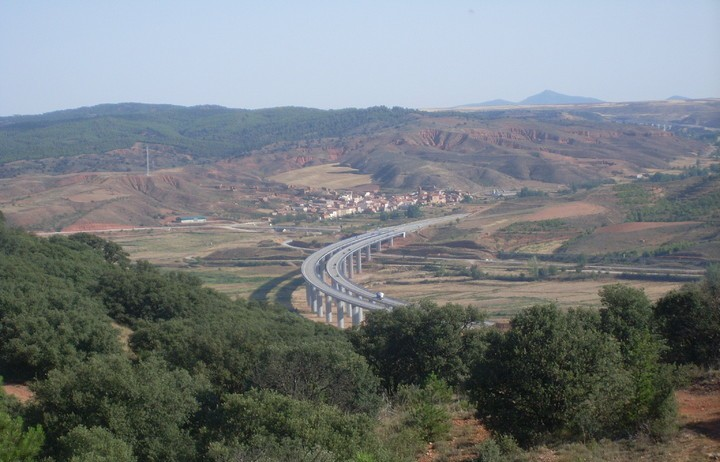 Pantano Lechago